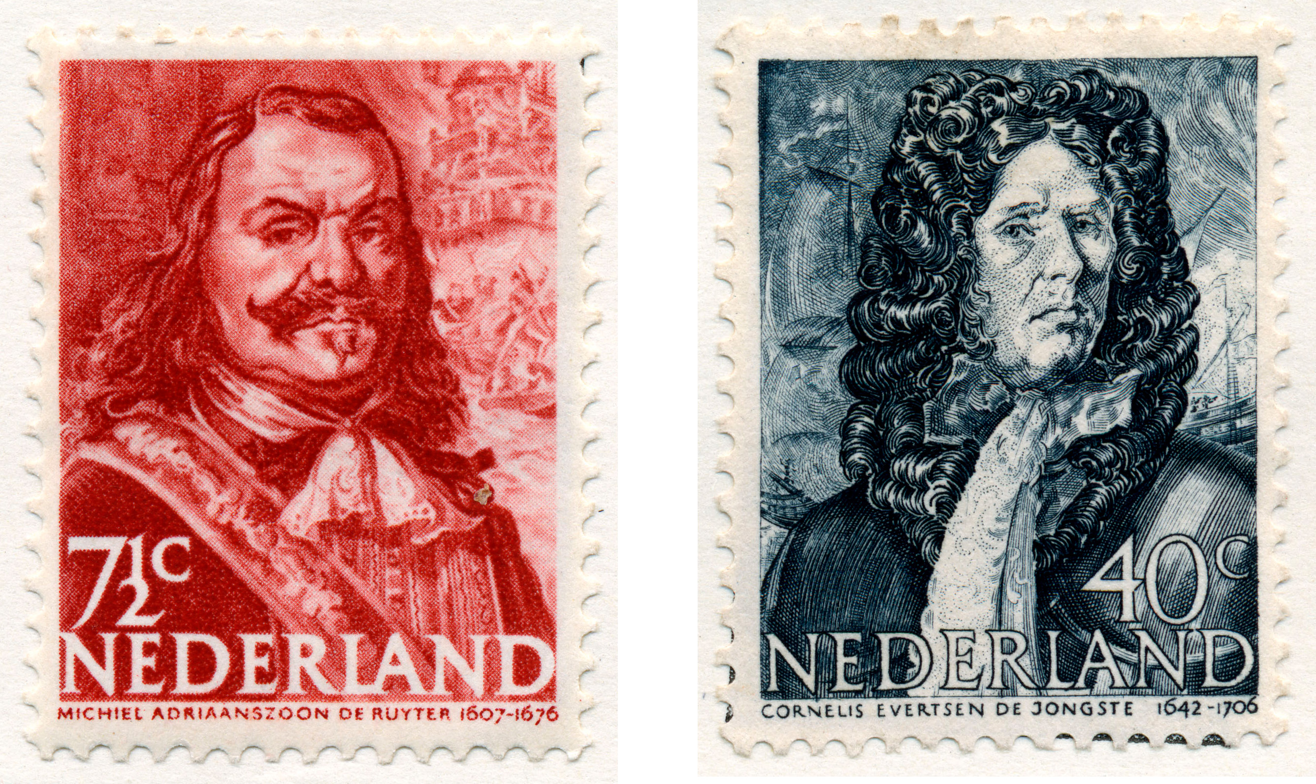 Postzegels 1943 Zeehelden ontwerp van S.L. Hartz